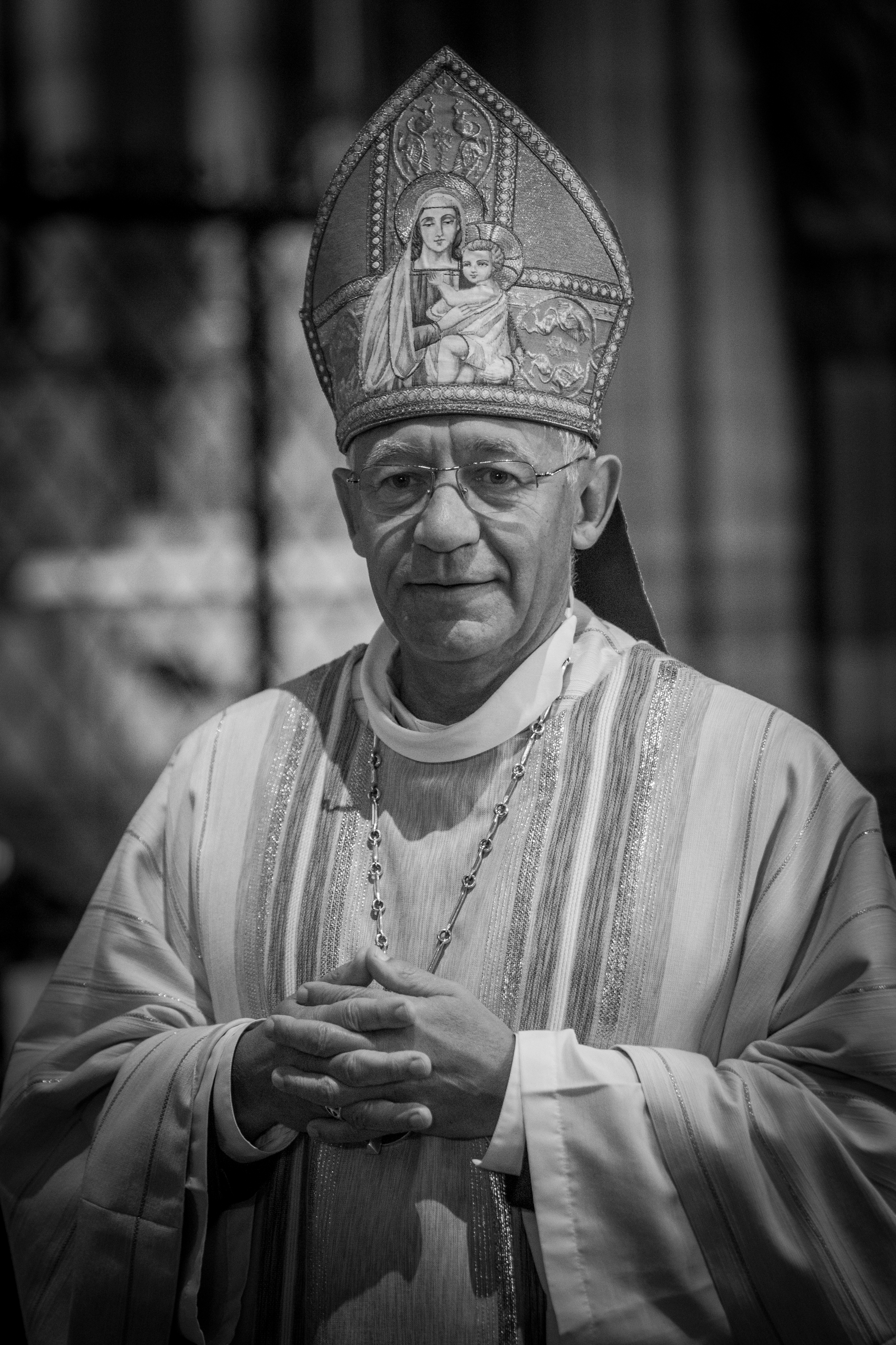 Luc Ravel, né le 21 mai 1957 à Paris, est un prêtre catholique français. Membre des chanoines réguliers de Saint-Victor, il a été évêque aux armées françaises de 2009 à 2017. Il est archevêque de Strasbourg depuis le 16 février 2017.